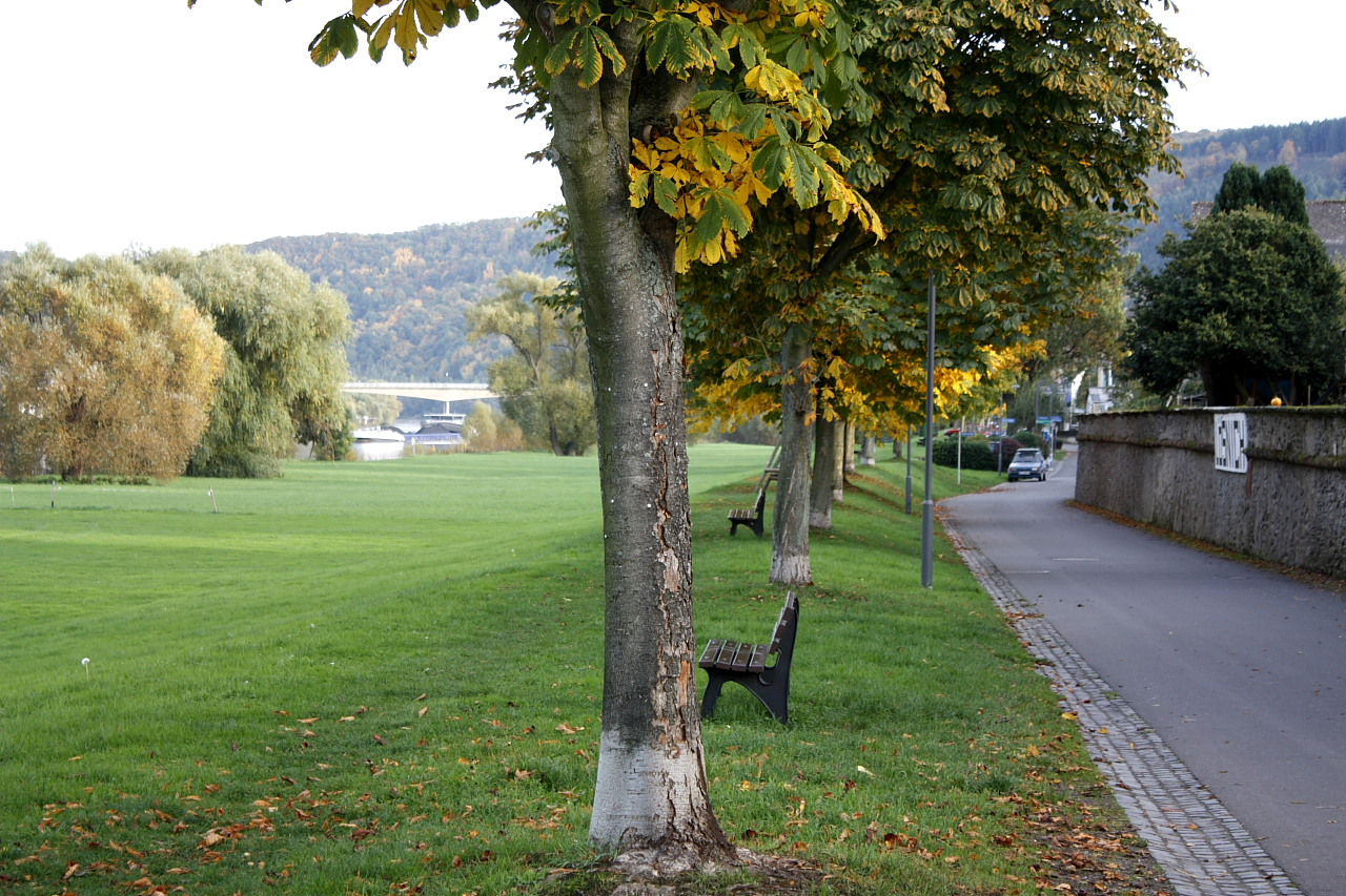 Ehemalige noch sichtbare Bahntrasse der Moselbahn in Lösnich Richtung Kinheim-Kindel.